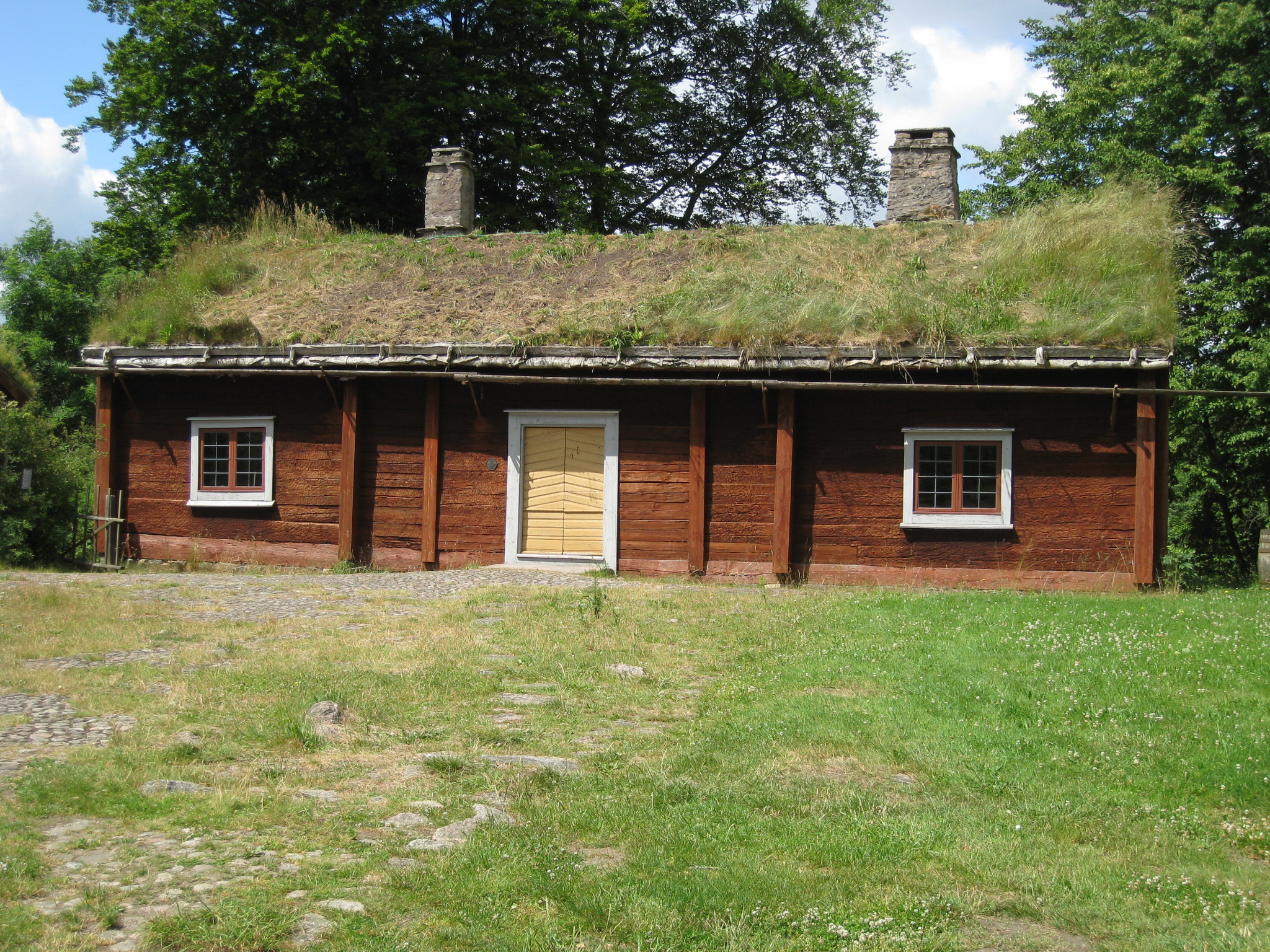 Linnés Råshult, Linnéstugan. Gården Råshult i Stenbrohults socken i Småland är känt som Carl von Linnés hembygd. Stenbrohults socken ingick i Allbo härad i Värend.